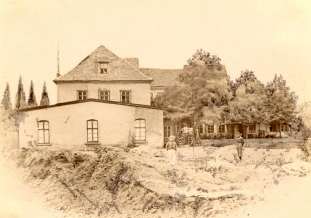 Fotografie des Leipziger Lokals Blaue Mütze mit dem Wiener Saal